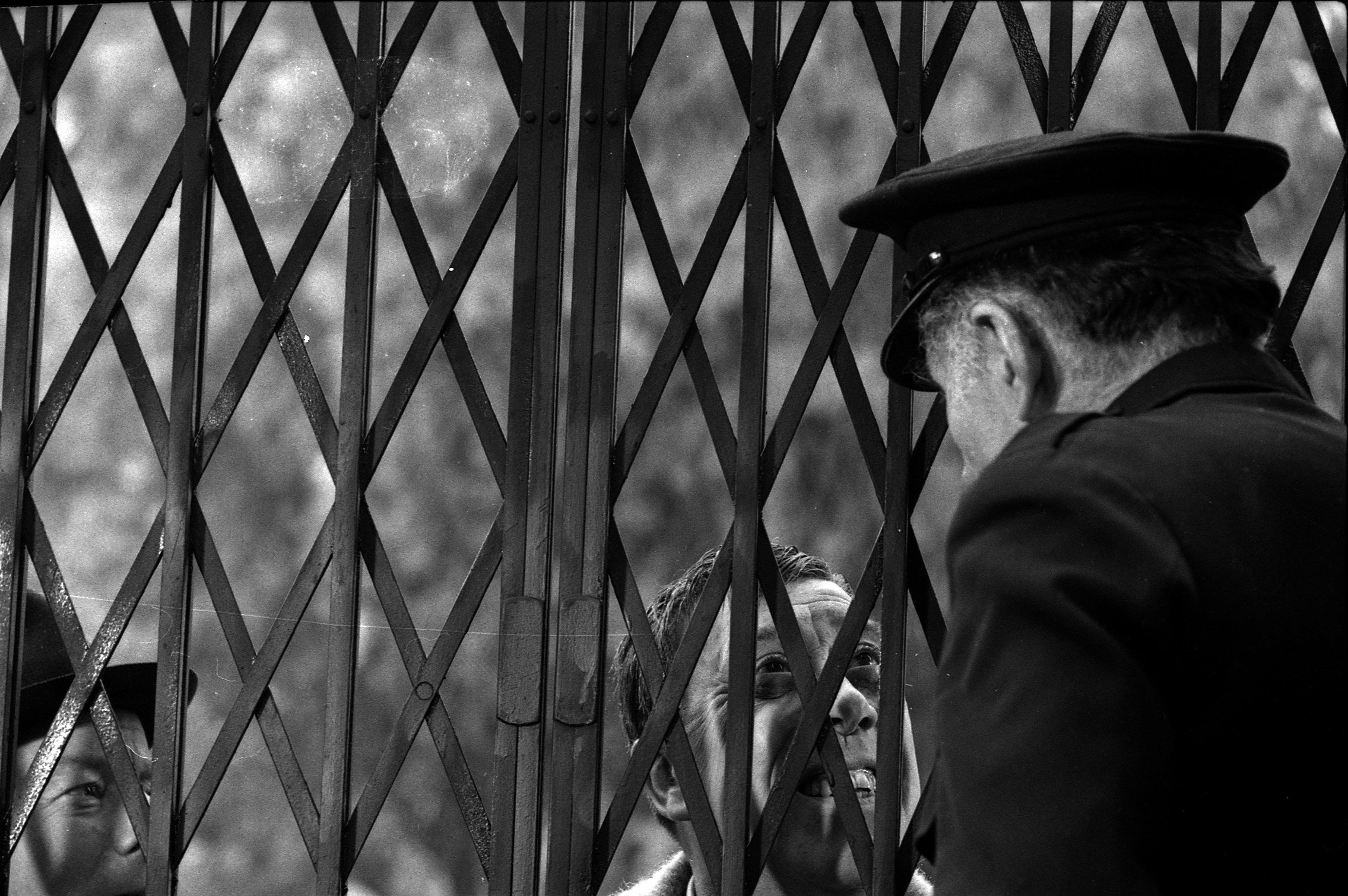 Quartier Saint-Sernin. Le 2 novembre 1965. Gros plan sur la grille refermée par un gardien (un acteur) regardant au travers l'acteur Fernandel, lors du tournage du film "La bourse ou la vie" de Jean-Pierre Mocky. Observation: Tournage du film "La Bourse ou la Vie" de Jean Pierre Mocky, dans le quartier de St Sernin.